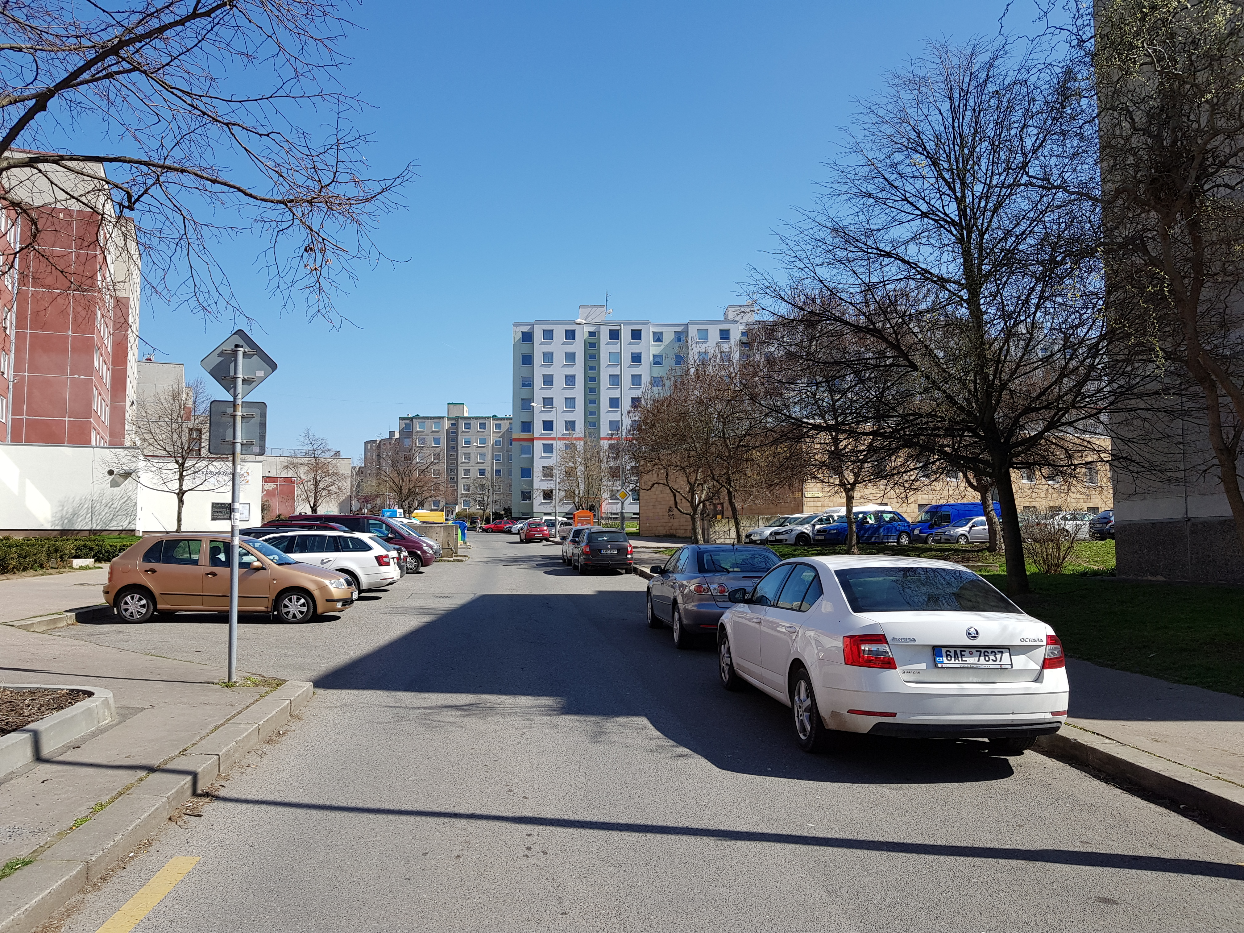 Kardašovská, Lehovec, Praha 14-Hloubětín, pohled východním směrem od ulice Krylovecké